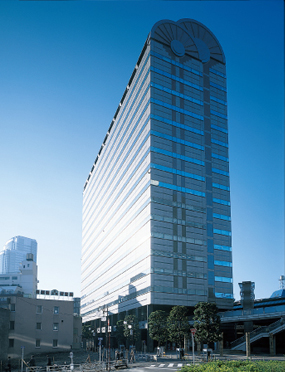 Ebisu neonart